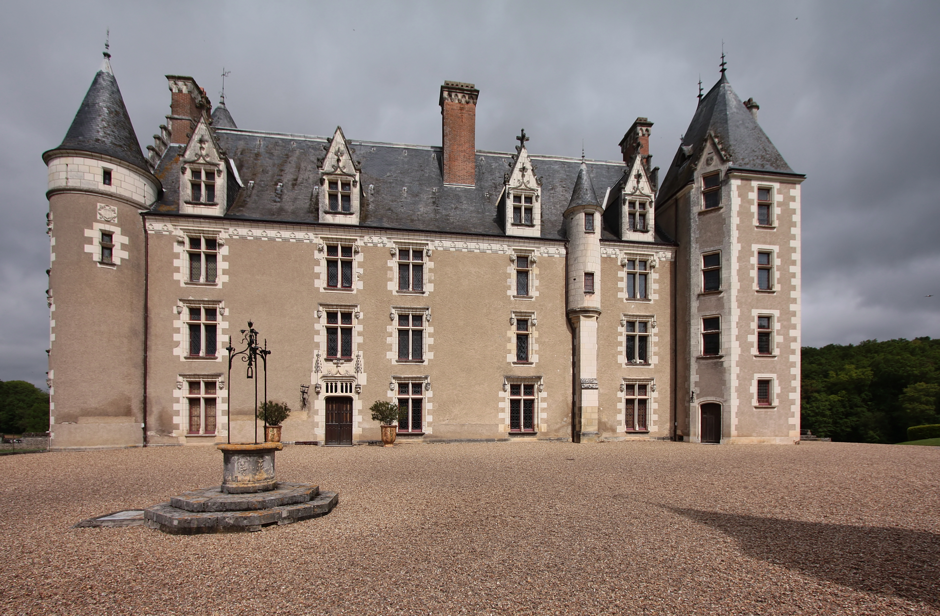 Schloss Montpoupon im Département Indre-et-Loire/Frankreich - Wohntrakt un Brunnen.